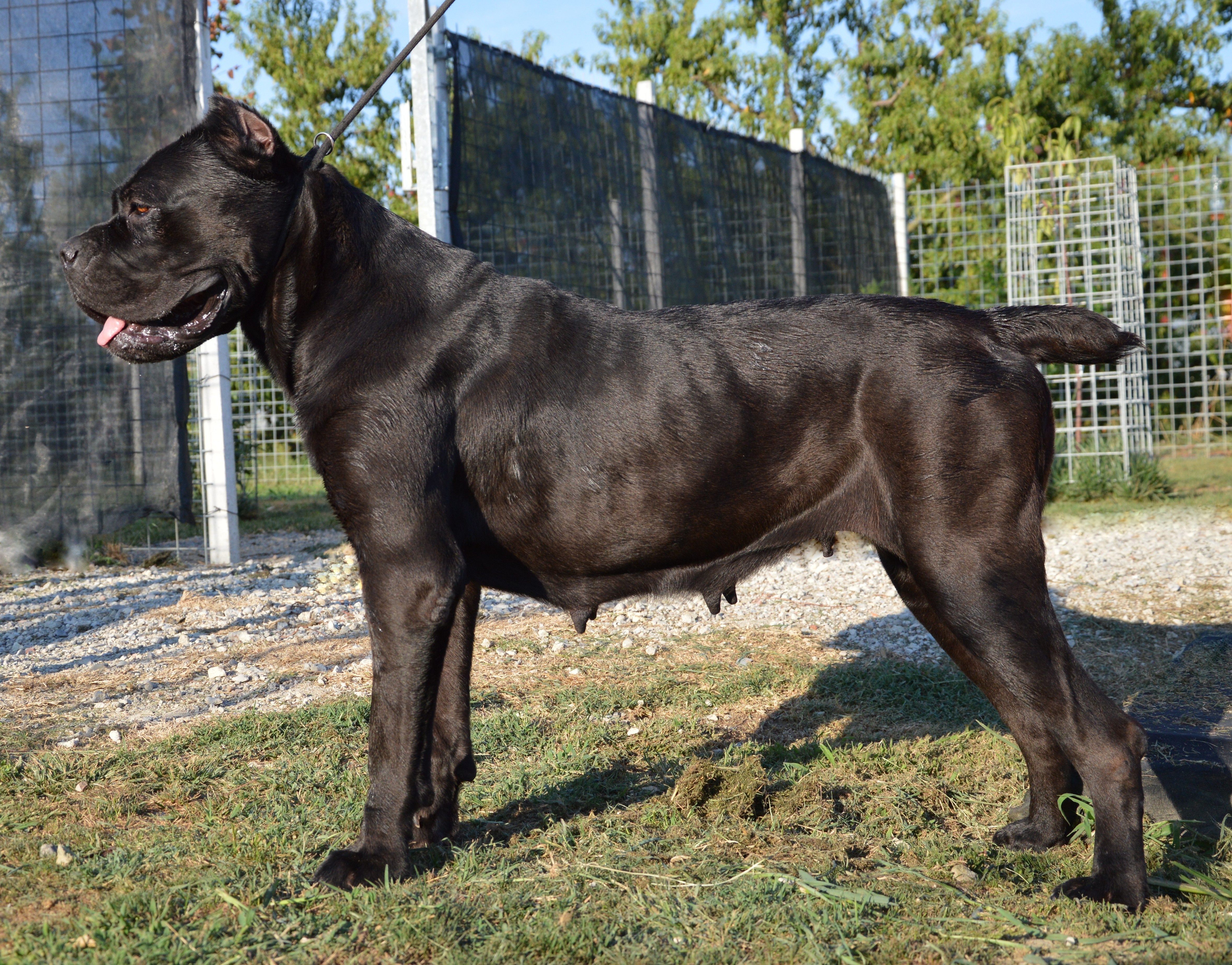 Anita Cane Corso Italiano allevato in Italia